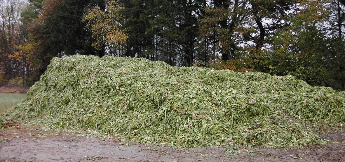 Rübenblätter in einem Haufen kurz vor der luftdichten Verschließung mit Folie. Die dann entstehende Silage kann als Viehfutter oder als Biogassubstrat eingesetzt werden.